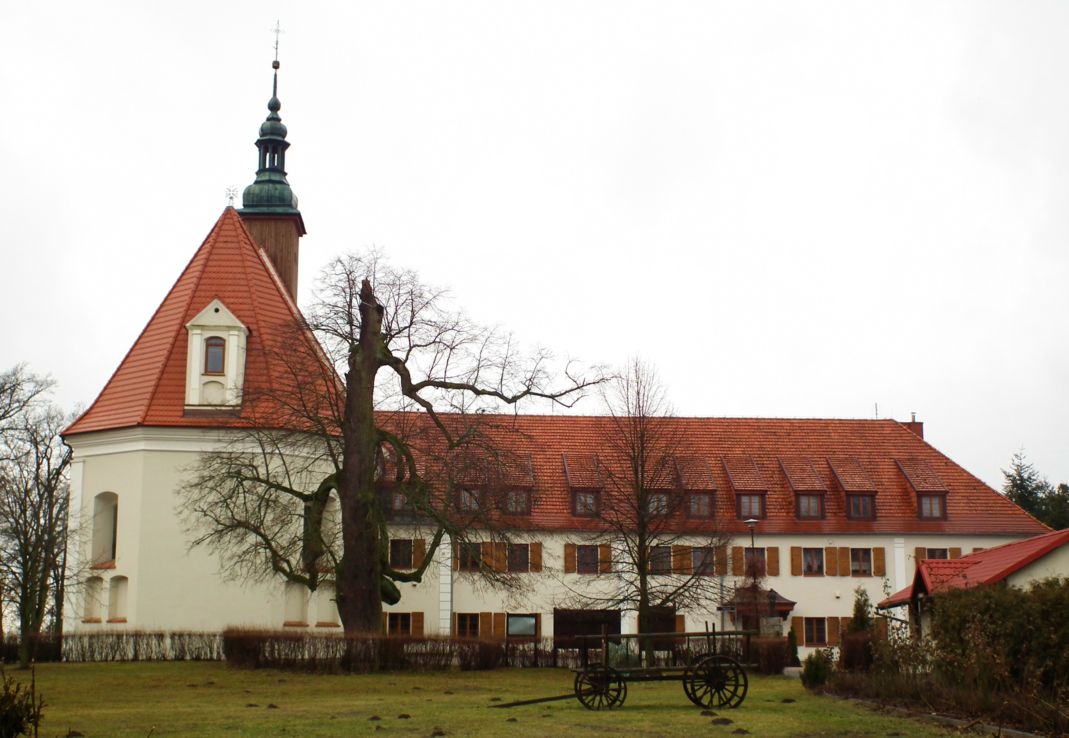 Sanktuarium w Górce Klaszt. (klasztor).